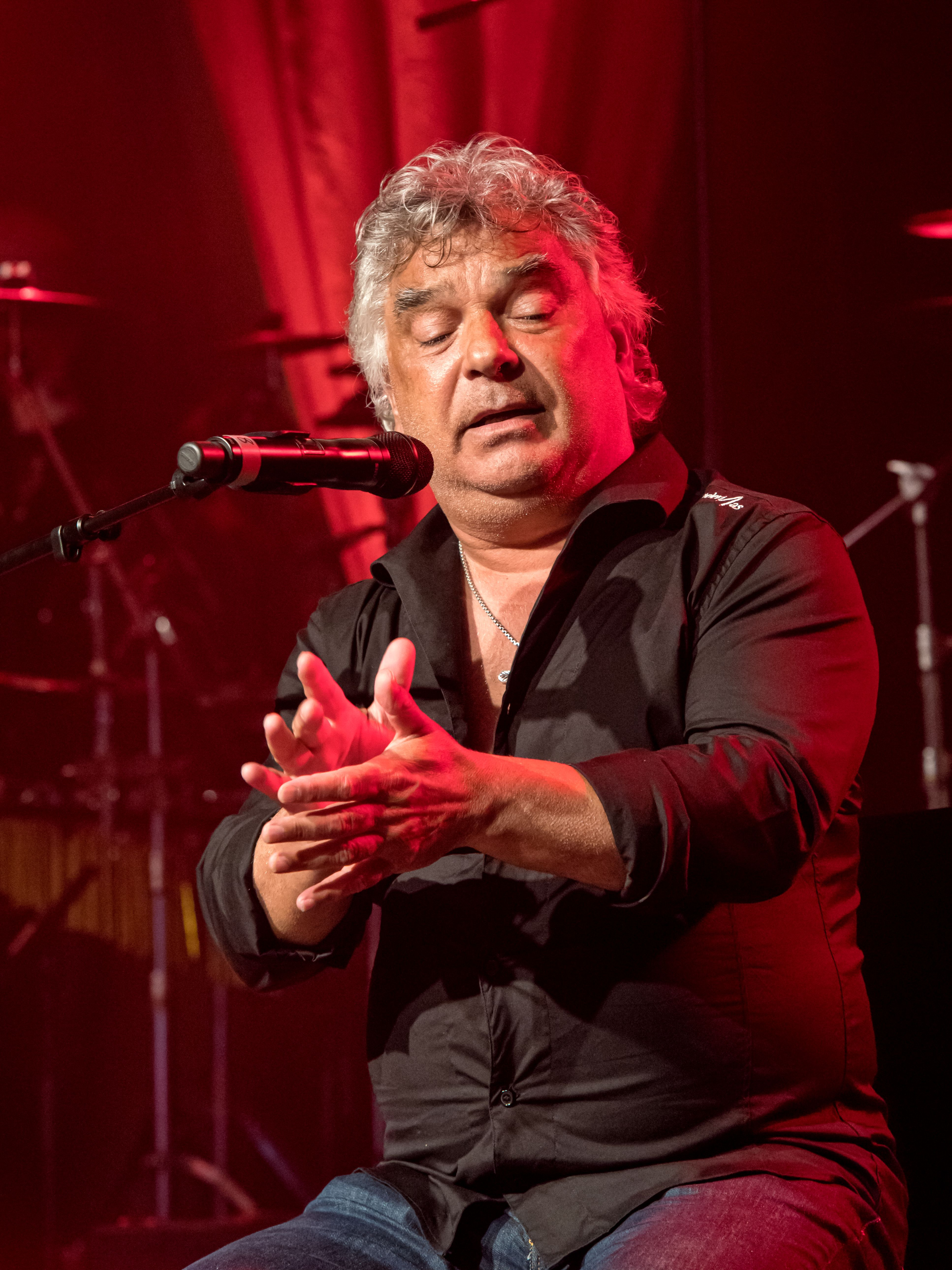 Bilder vom Zelt Musik Festival 2016 in Freiburg im Breisgau Gipsy Kings